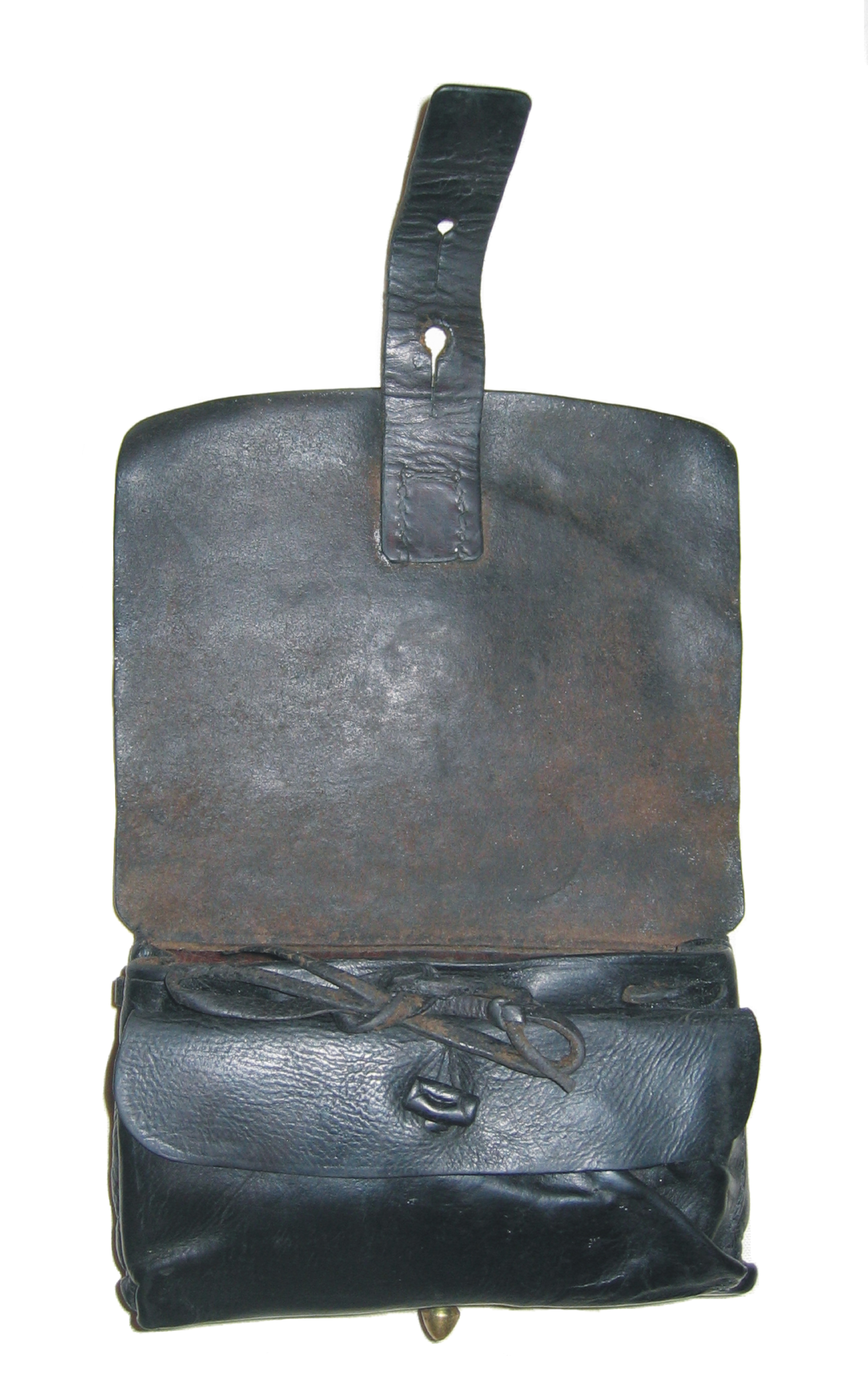 Giberne du mousqueton Vetterli de cavalerie. Elle se porte au ceinturon.